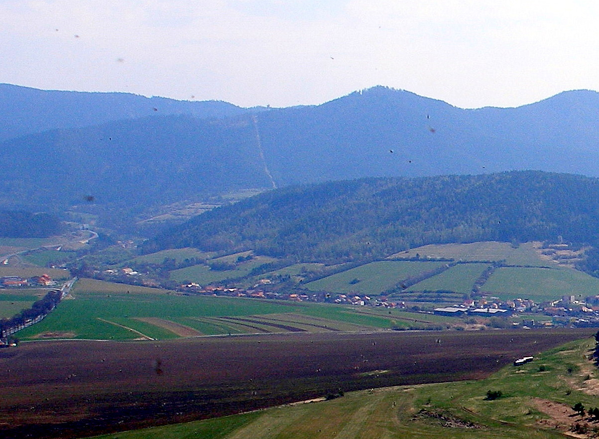 Okolie obce Beharovce, okres Levoča. V pozadí pohorie a tunel Branisko.